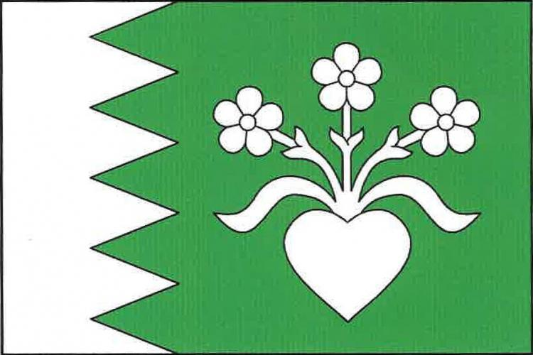 vlajka, Lesní Jakubov, okres Třebíč